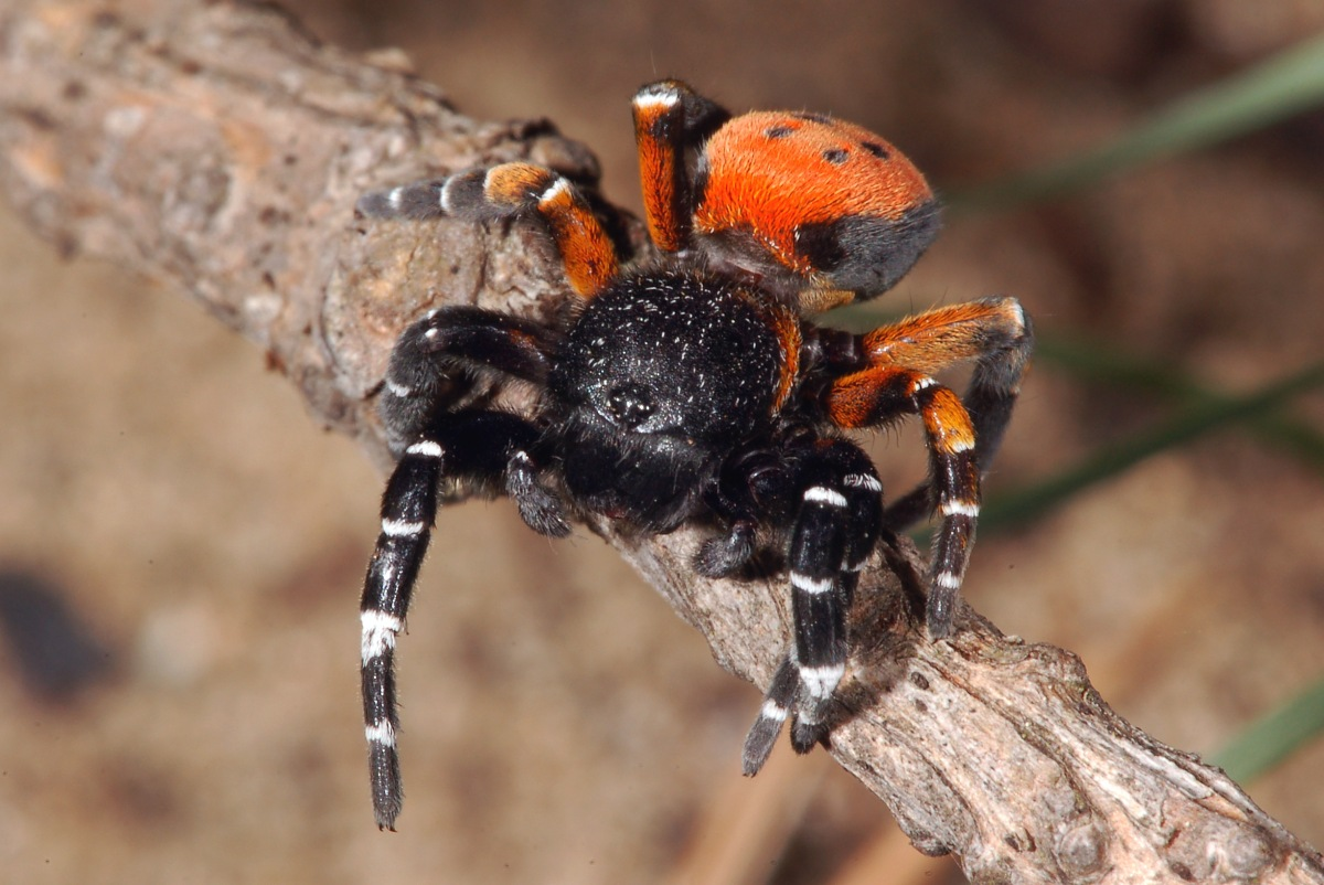 Eresus kollari, Pfungstädter Düne, Pfungstadt, Hessen, Deutschland